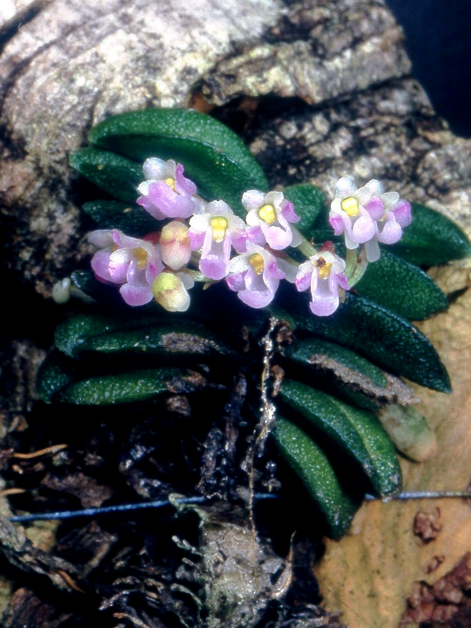 Schoenorchis seidenfadenii